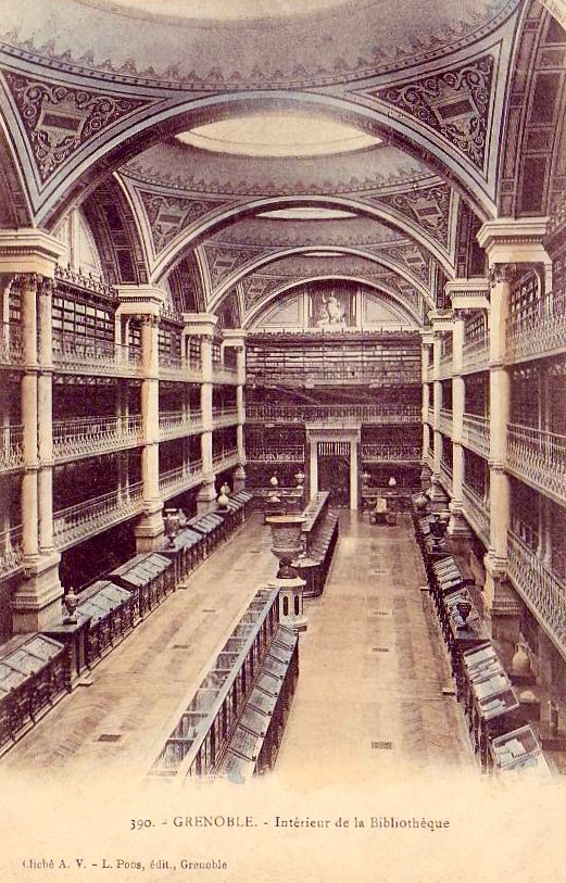 Grenoble, intérieur bibliothèque, vers 1905.